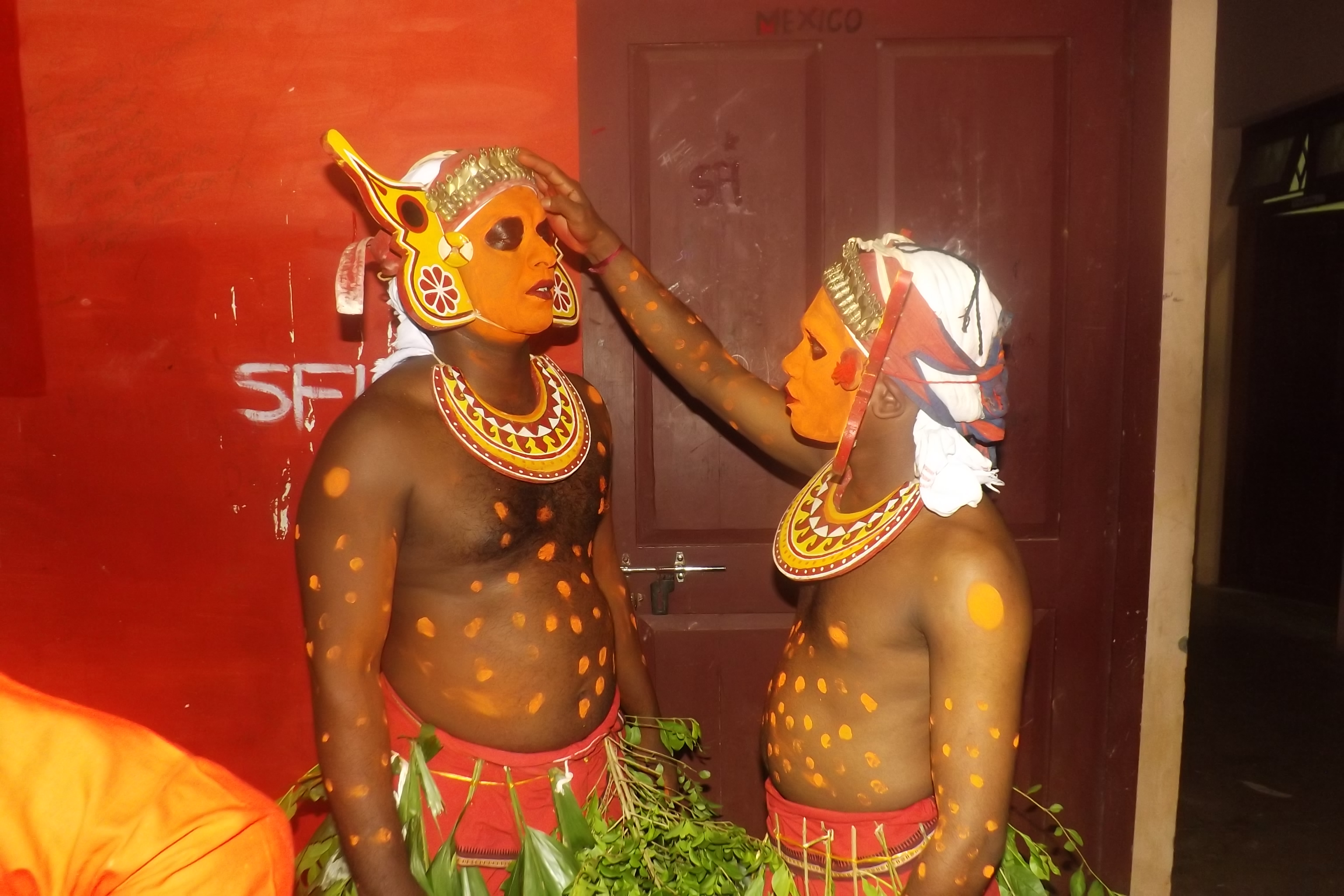 ഉത്തര കേരളത്തിലെ കൃഷിയുമായി ബന്ധപ്പെട്ട് പുലയ സമുദായം രൂപപ്പെടുത്തിയെടുത്ത ഗ്രാമീണനാടകമാണ് ചിമ്മാനക്കളി. പുലയർ പാടിവരാറുള്ള “ചോതിയും പിടയും” എന്ന ദീർഘമായ പാട്ടിലെ കഥാഭാഗമാണ് ഇതിനവലംബം. പുലയ വിഭാഗത്തിന്റെ ചരിത്രവും ദൈന്യതകളും ജീവിതത്തിന്റെ അനിശ്ചിതത്വങ്ങളും പാട്ടിനോടൊപ്പം നൃത്ത–അഭിനയ രൂപത്തിൽ ആവിഷ്കരിക്കുന്നു. നർമ്മരസമൂറുന്ന പാട്ടുകളും സംഭാഷണങ്ങളും ഉണ്ടാകും. തുടിയാണ് വാദ്യം. മാവിലൻ , മാവിലത്തി, മാപ്പിള തുടങ്ങിയവർ കഥാപാത്രങ്ങളാണ്.കണ്ണൂർ ജില്ലയിലെ പഴയങ്ങാടി, മാട്ടൂൽ പ്രദേശത്ത് മാത്രമേ ചിമ്മാനക്കളി നിലവിലുള്ളൂ. കാഞ്ഞൻ പൂജാരിയുടെ മകൻ കെ. കുമാരനും സംഘവുമാണ് ഈ കലാരൂപത്തിന്റെ പ്രായോജകർ. This photo has been taken in the country: India